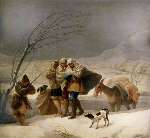 La nevada. Cartones para tapices. Óleo sobre lienzo, 275 × 293 cm. Madrid, Museo del Prado